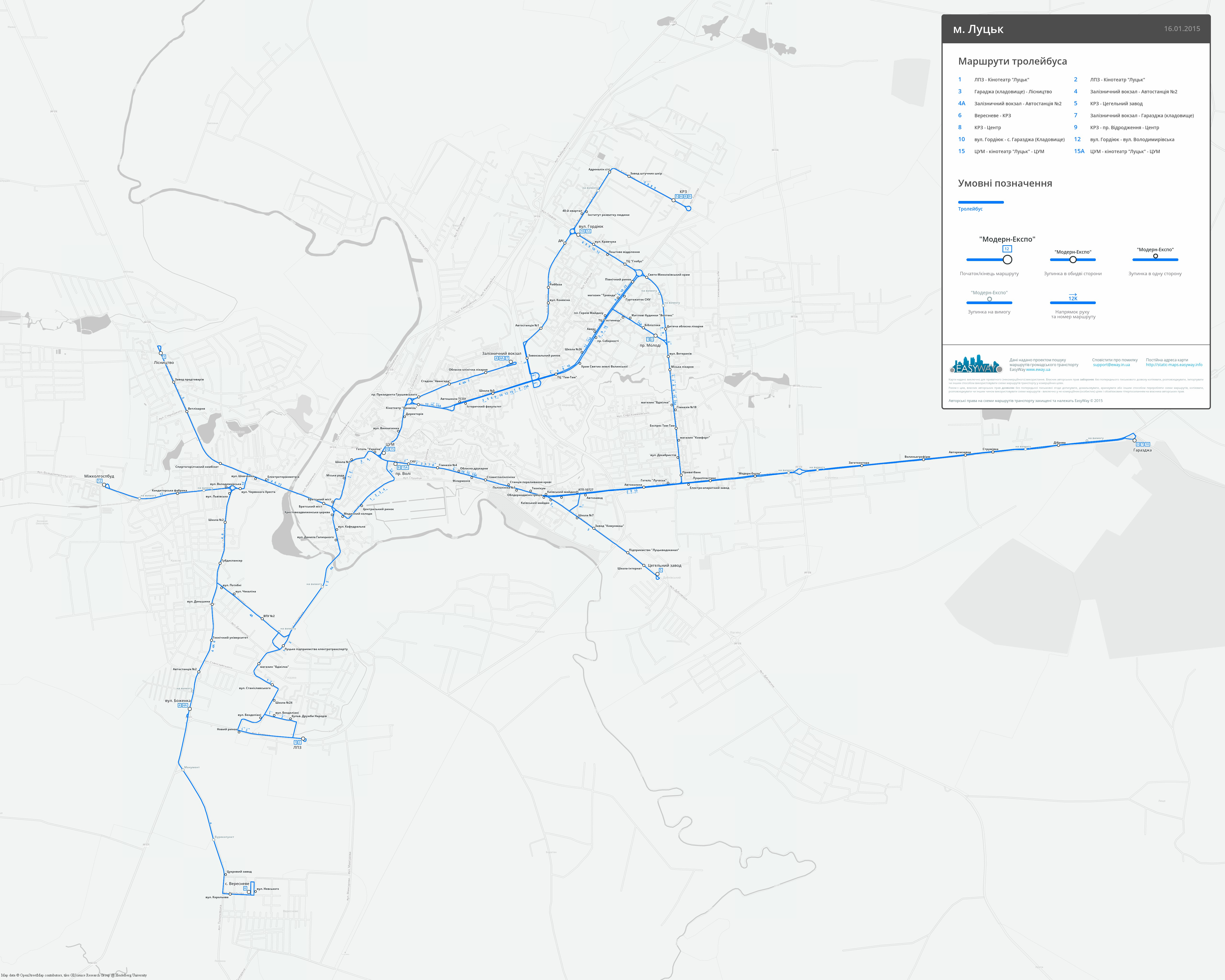 Схема тролейбусних маршрутів у місті Луцьк